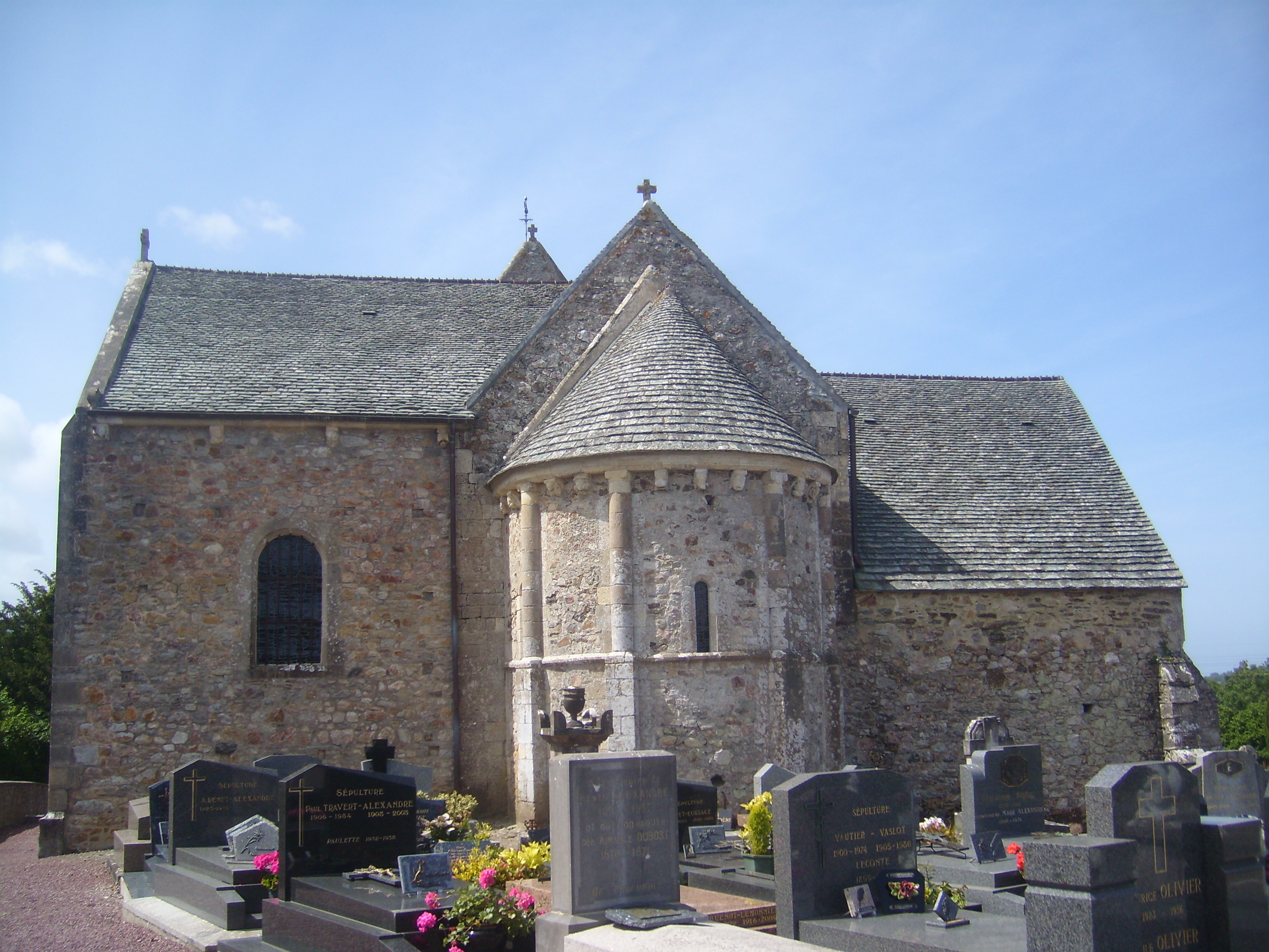 Martinvast - Église Notre-Dame, choeur . .